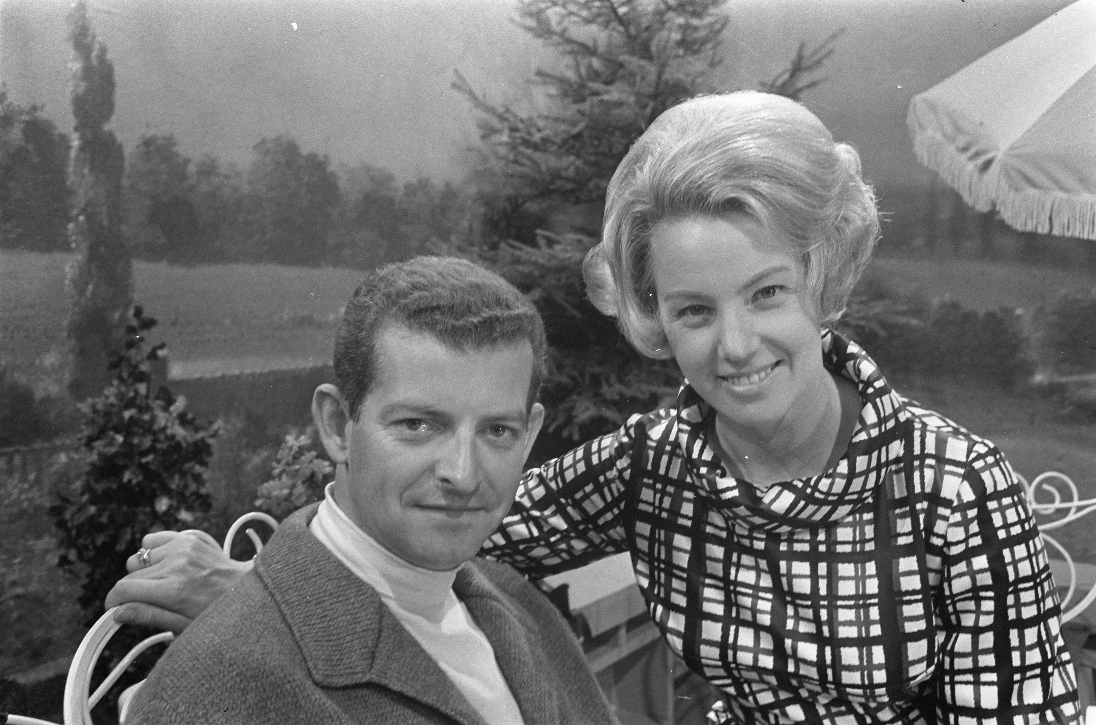 Collectie / Archief : Fotocollectie Anefo Reportage / Serie : "Zonzin", Tros T.V. met Karin en Maarten van Wamelen Beschrijving : televisieprogramma's, presentatoren, groepsportretten Datum : 6 augustus 1968 Trefwoorden : groepsportretten, presentatoren, televisieprogramma's Persoonsnaam : Wamelen, Karin van, Wamelen, Maarten van Fotograaf : Fotograaf Onbekend / Anefo Auteursrechthebbende : Nationaal Archief Materiaalsoort : Negatief (zwart/wit) Nummer archiefinventaris : bekijk toegang 2.24.01.05 Bestanddeelnummer : 921-5760 Reacties Geplaatst door Maaike op 14 juli 2012 - 11:32. Karin van Wamelen-Kraaykamp, televisie presentatrice